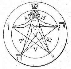 Pentagram